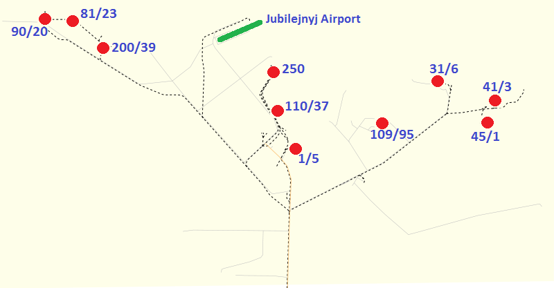 Hlavní odpalovací rampy na kosmodromu Bajkonur. Podklad mapy použit z anglické wikipedie článku Baikonur Cosmodrome + vlastní úprava